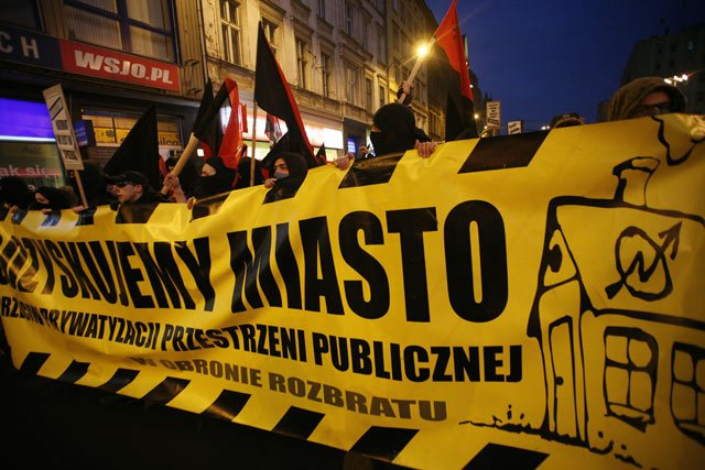 Zdjęcie ze strony skłotu Rozbrat. Za zgodą kolektywu.